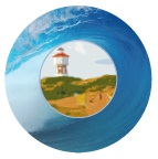 Logo der "Woche für gesunde Entwicklung" (WogE)